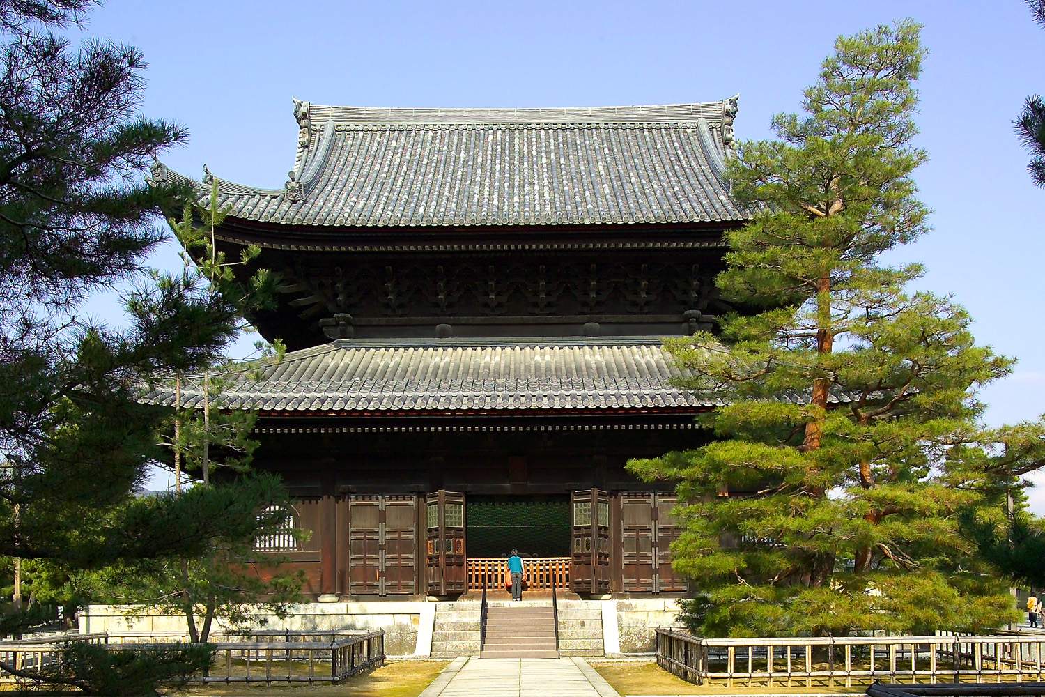 Butsuden 仏殿 at Myōshin-ji in Kyoto, Japan.